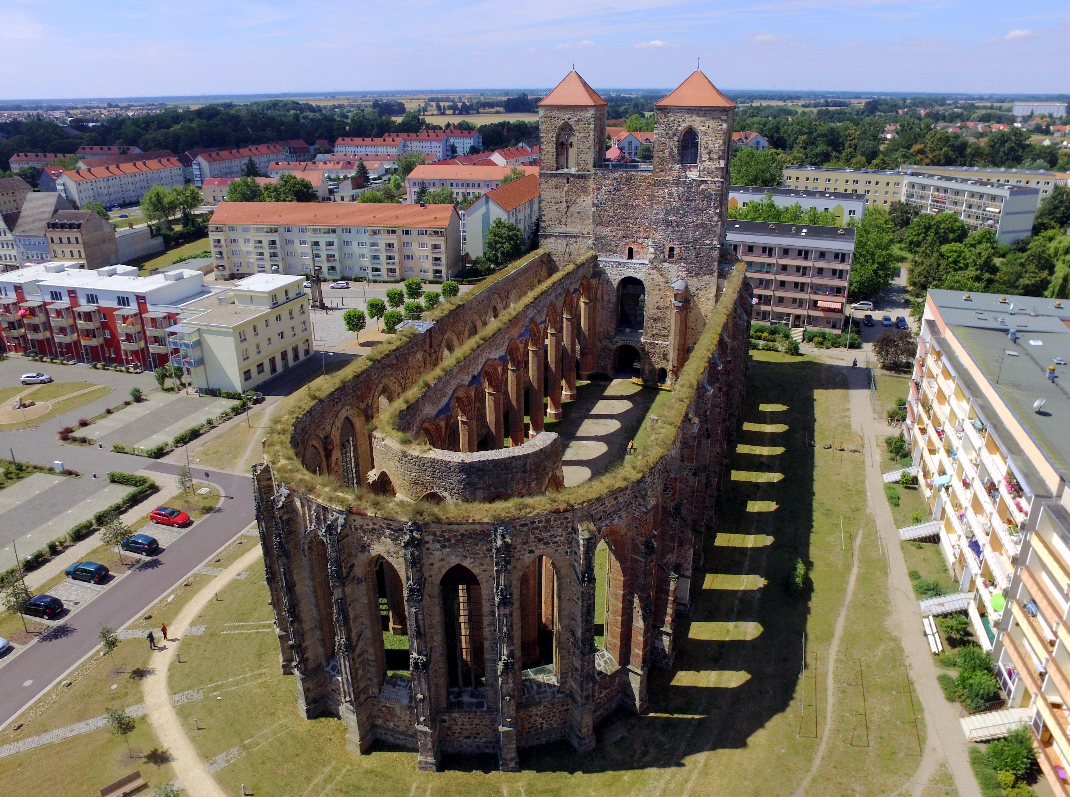 Die Kirchenruine St. Nikolai in Zerbst / Sachsen Anhalt